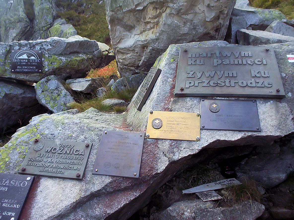 Kocioł Łomniczki - największy kocioł polodowcowy w Karkonoszach, Łomniczka spada tu licznymi kaskadami tworząc przepiękny jar. W kotle w 1985 roku utworzono symboliczny cmentarz ludzi gór (ofiar gór) - na jednej z tablic widnieje napis "martwym ku pamięci żywym ku przestrodze"